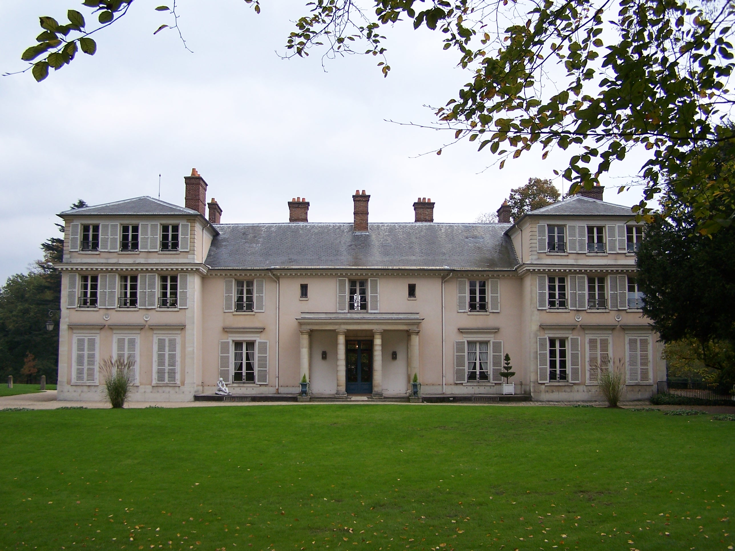 Château de Montreuil à Versailles (Yvelines, France), demeure de Madame Élisabeth, sœur de Louis XVI